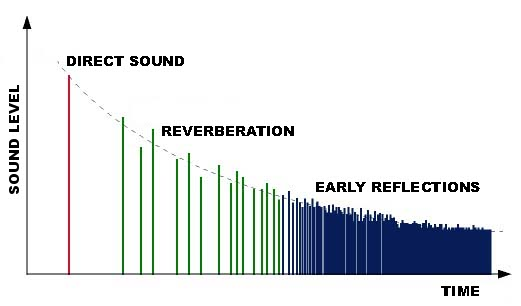 മുറികളീൽ ശബ്ദത്തിന്റെ പ്രതികരണം ‍